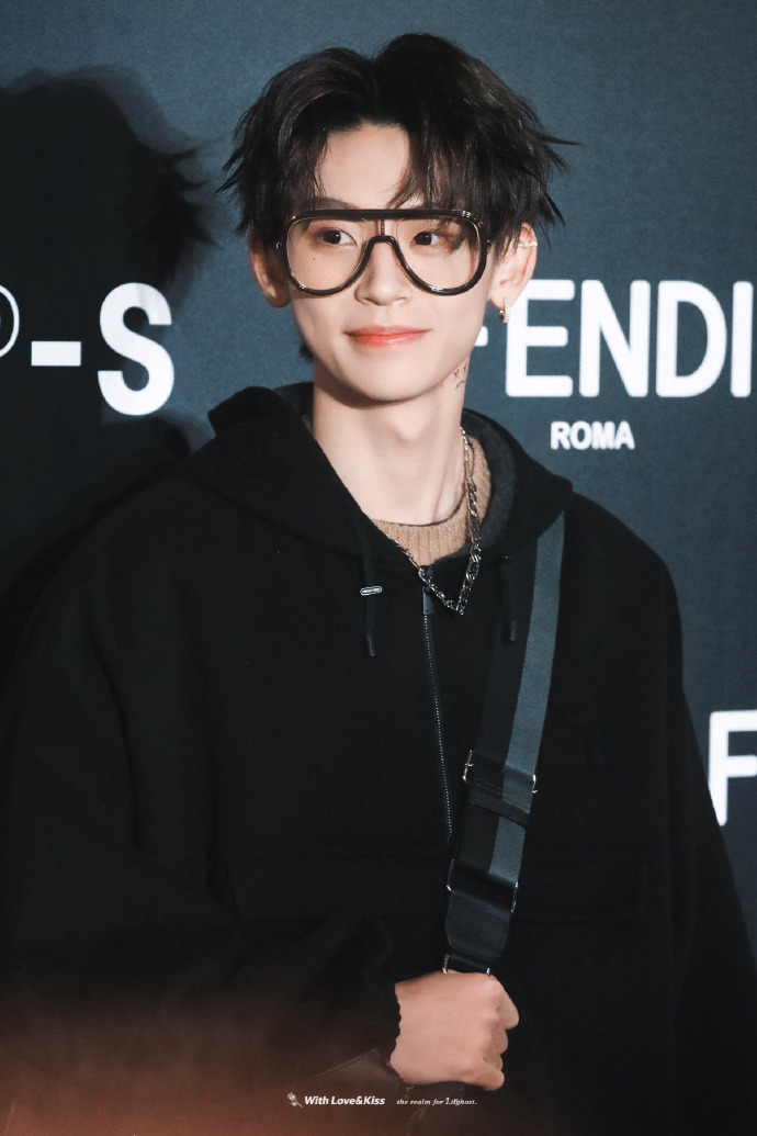 小鬼-王琳凯2019/12/13出席Fendi活动